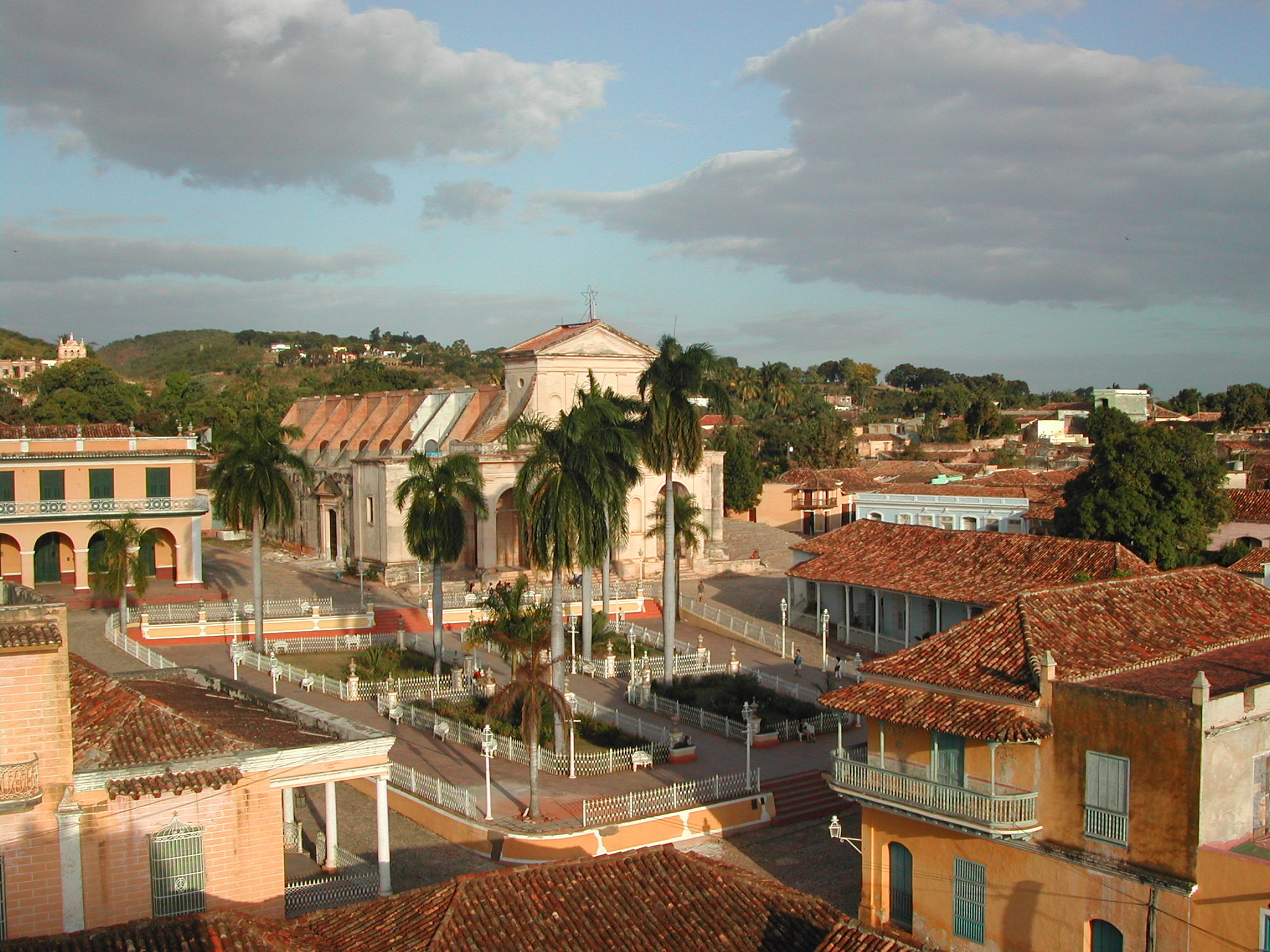 L'église de la Sainte Trinité et la Plaza Mayor vues depuis la tour du Musée à Trinidad, Cuba.